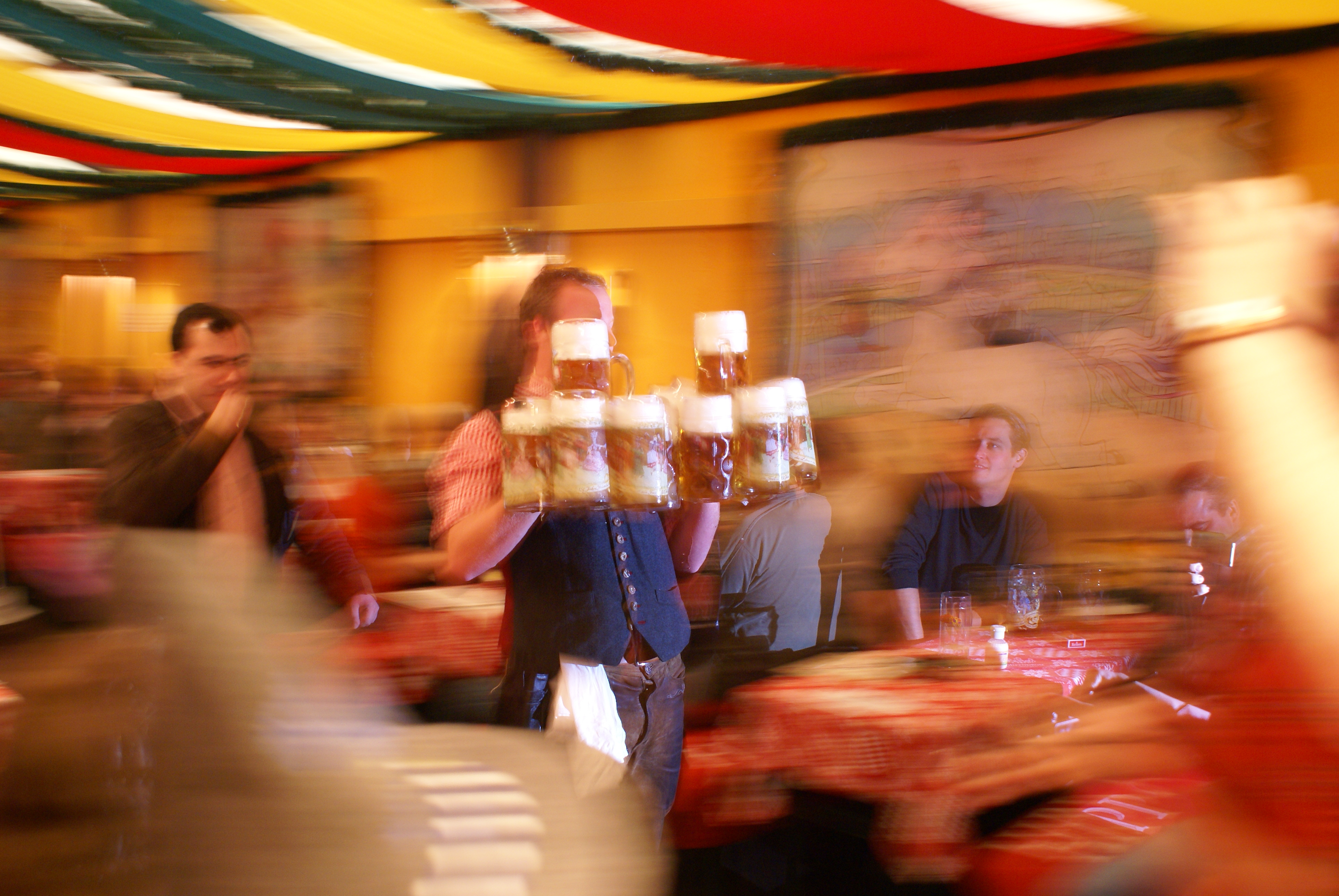 Октоберфест - 2008, Гипподром, 10 кружек.